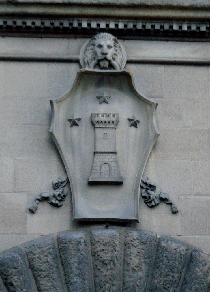 Stemma della famiglia Torrigiani, a Firenze.